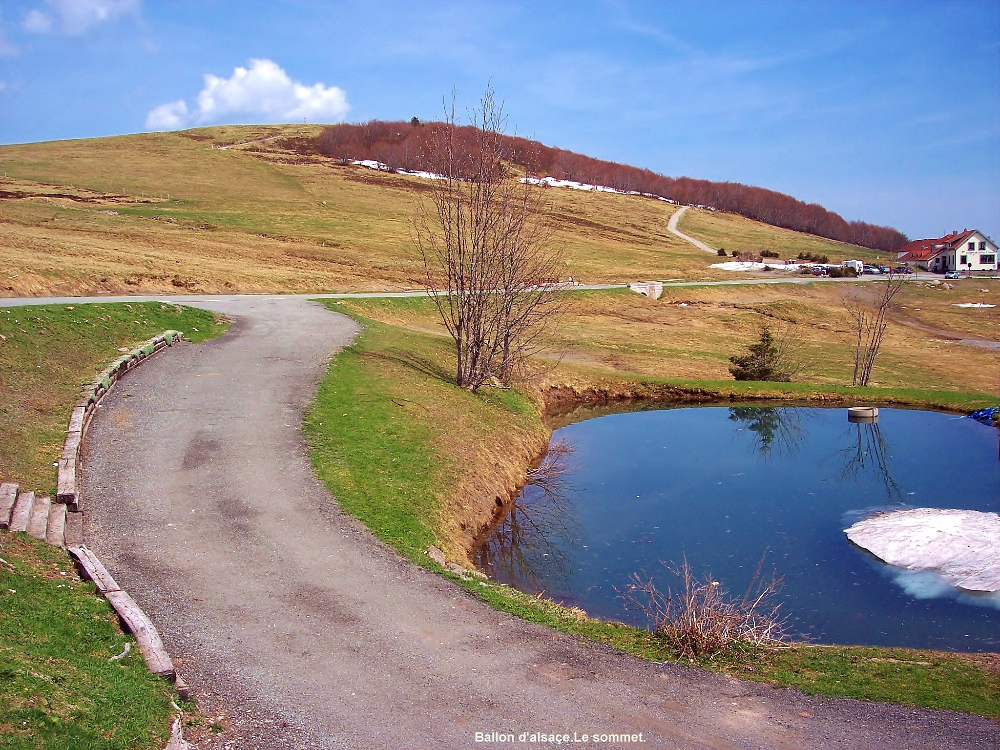 Sommet Sud-Est du ballon d'Alsace, vu de la terrasse de l'hôtel.